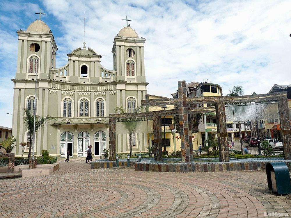 Ciudad Ramiro G.